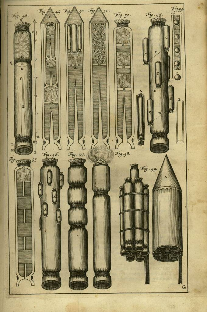 Беларуская (тарашкевіца): Казімер Семяновіч. Ілюстрацыя з кнігі "Вялікае мастацтва артылерыі" (лац. "Artis magnae artileriae pars prima")